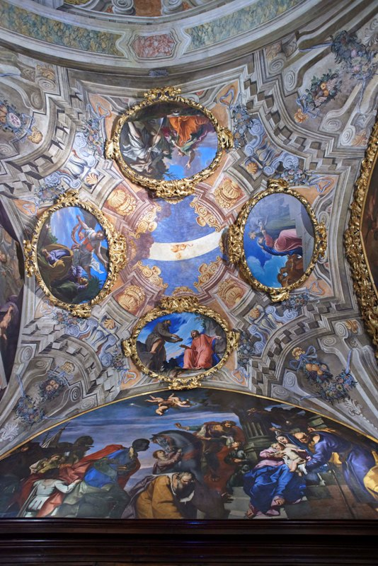 Volta con quadrature pittoriche murali a carattere illusionistico e di sfondamento prospettico realizzate da Andrea Zanoni, artista padovano